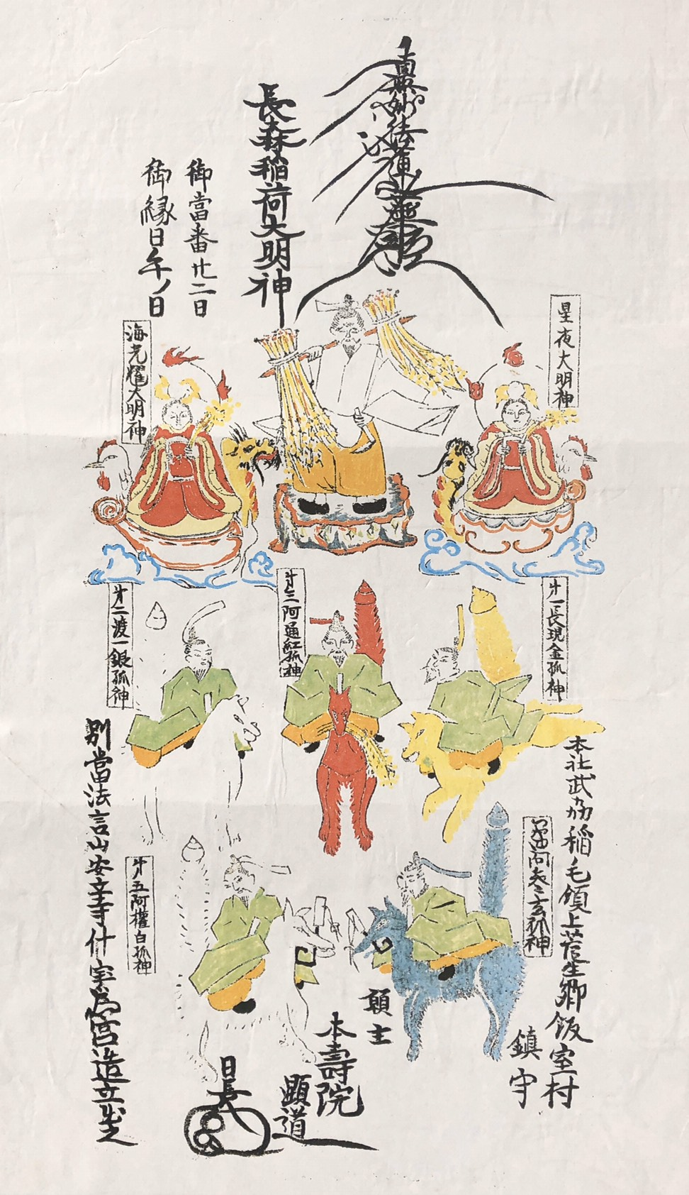 御神体